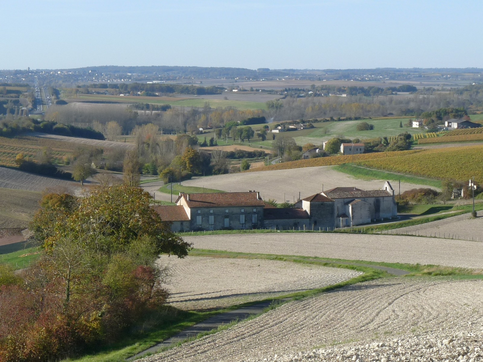 Bourg de Nonaville, Charente, France